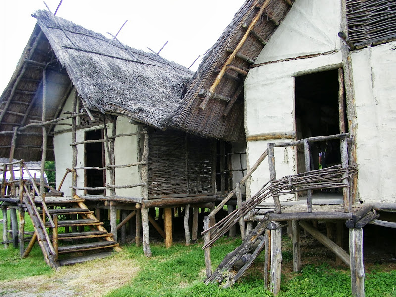 Terramara di Montale (Modena), abitazioni ricostruite